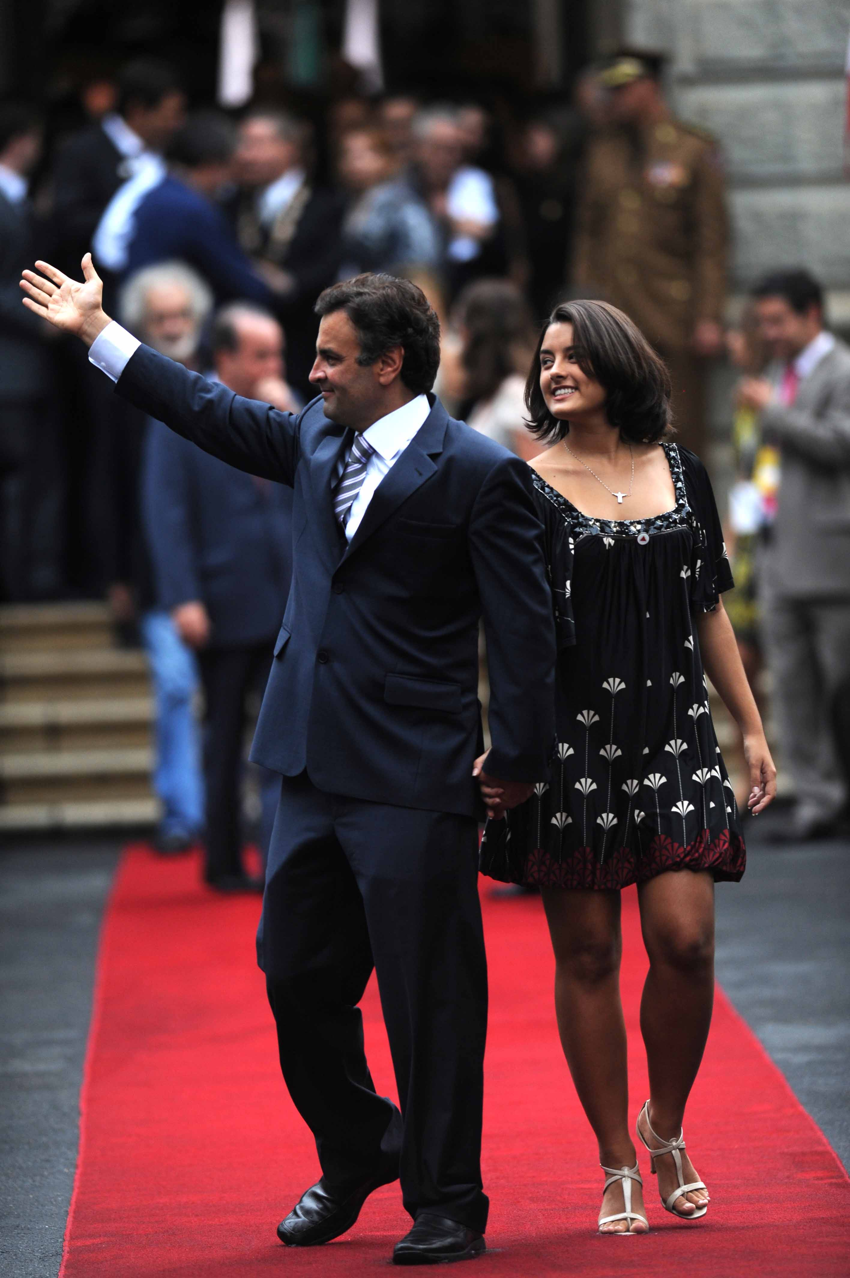 Aécio Neves com a filha Gabriela em 31 de março de 2010.